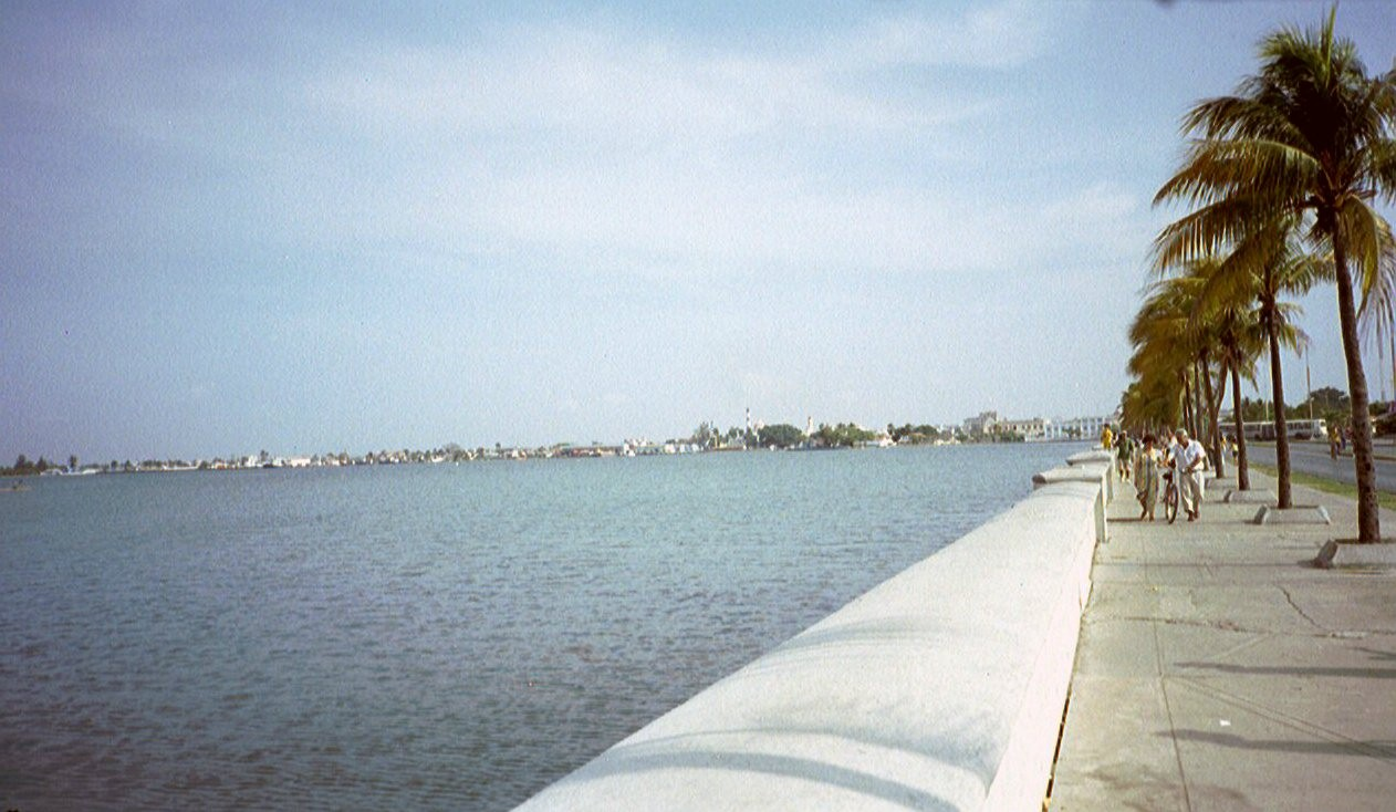 Promenade am Meer in Cienfuegos